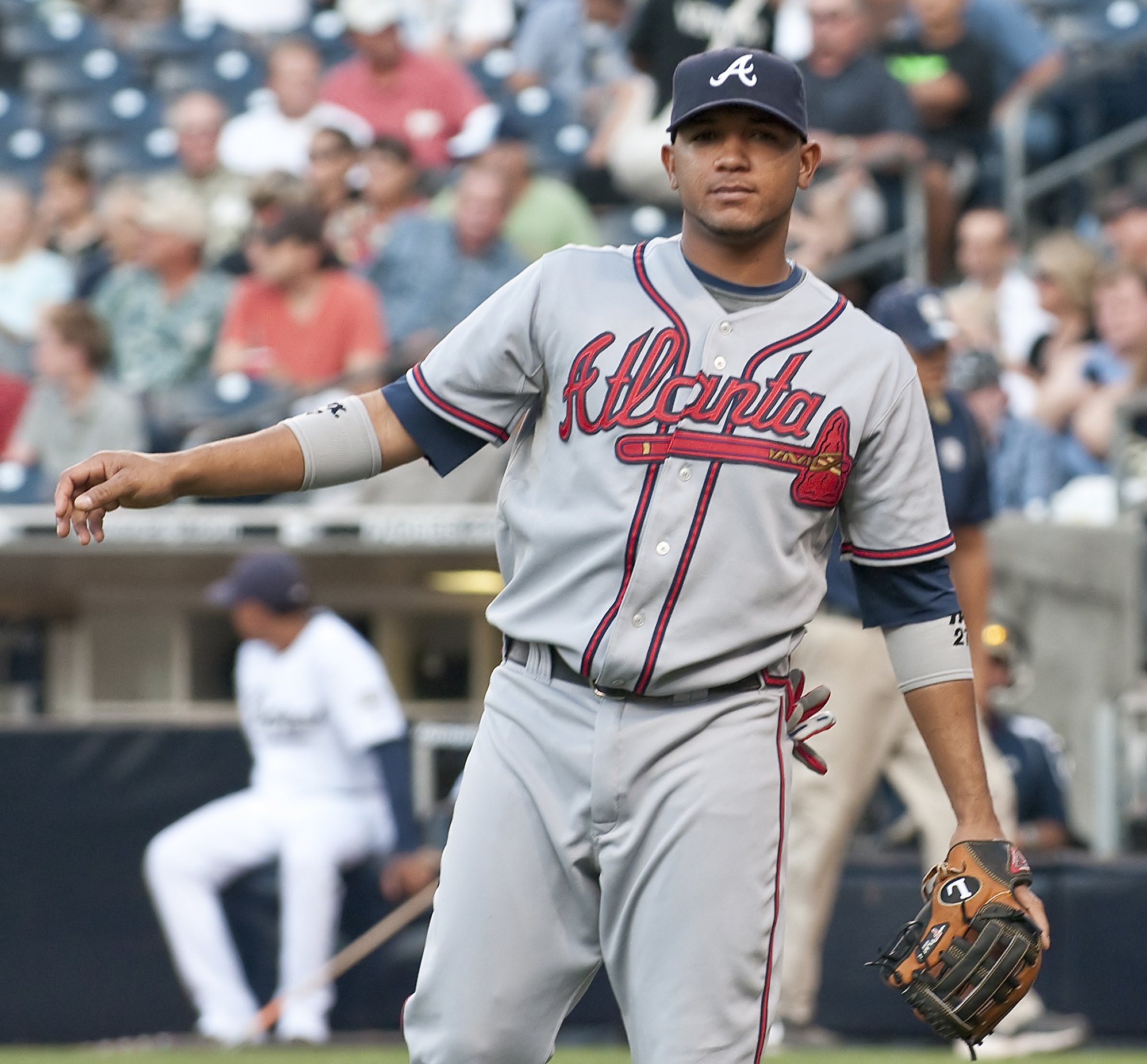 Diory Hernández